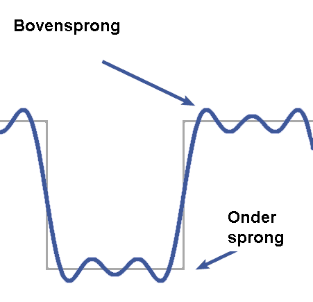 Verschijnsel van Gibbs.